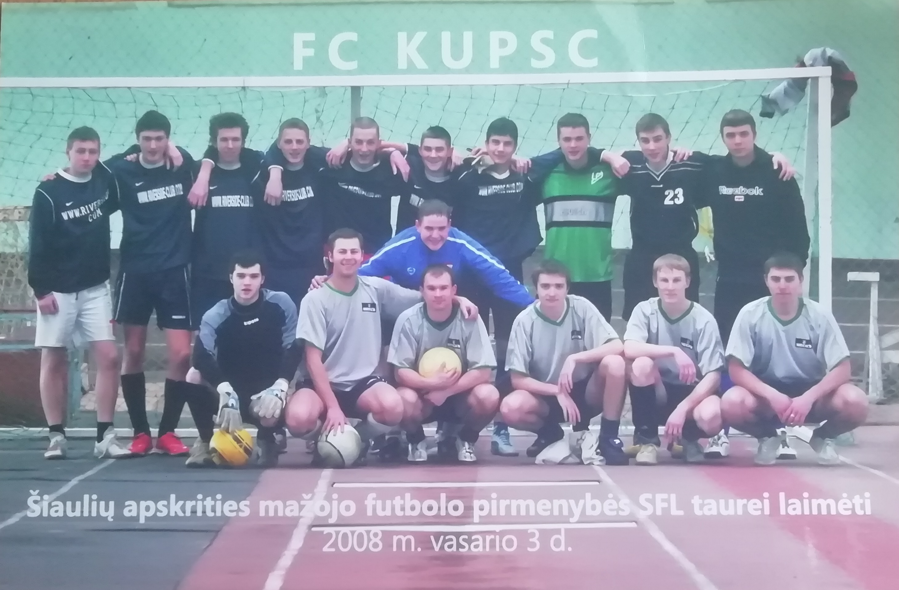 FC Kupsc komanda 2008 m. ŠAFF mažojo futbolo pirmenybėse